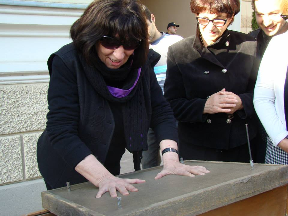 ელისო ვირსალაძე სასახლეში ხელის ანაბეჭდს ტოვებს